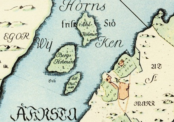 Petrus Tillaeus karta över Stockholm från 1733, del av Södermalm med Molitors malmgård